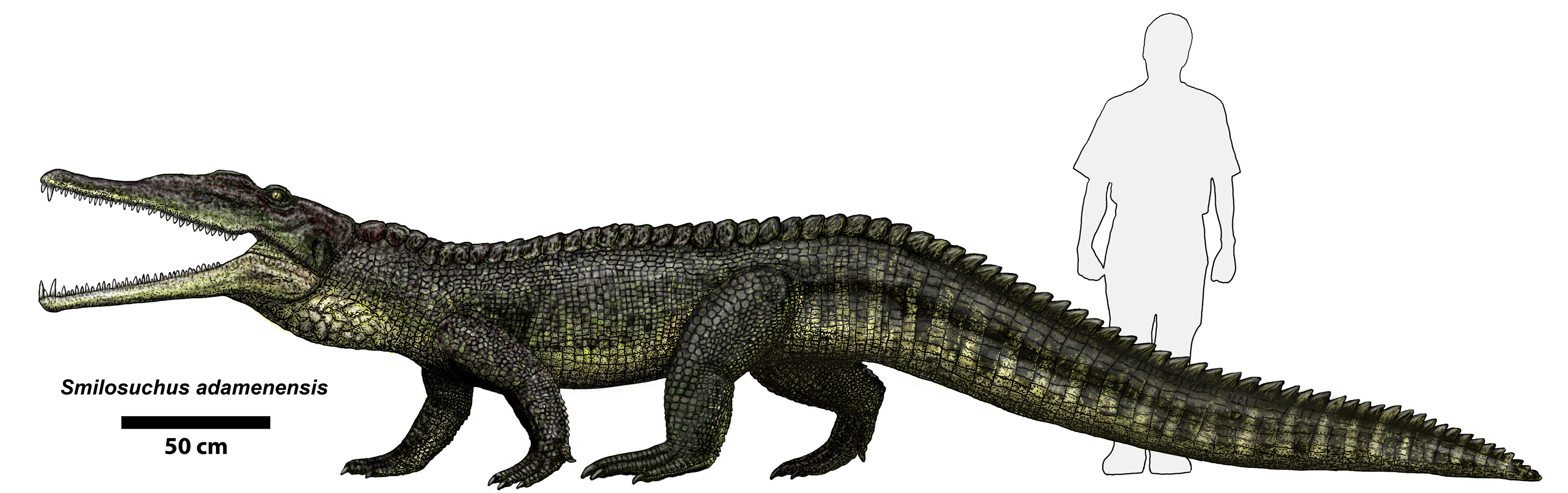 Credit Dr. Jeff Martz/NPS